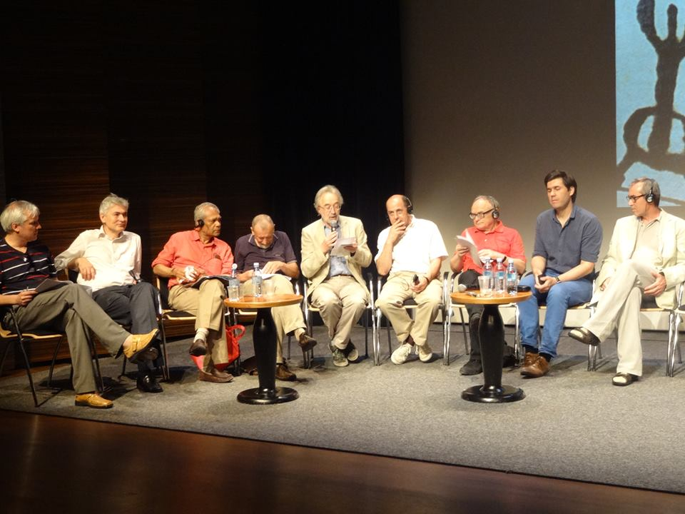 Prof. dr hab. Edward Kasperski podczas The 4th International Symposium of Miklavž Ocepek (2013) - New oikonomy of relationship: Neighbour and existential turn (Ljubljana, Słowenia 12-18.06-2013)